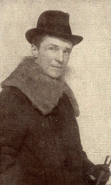 Emil Pirchan, Bühnenbildner, 1921